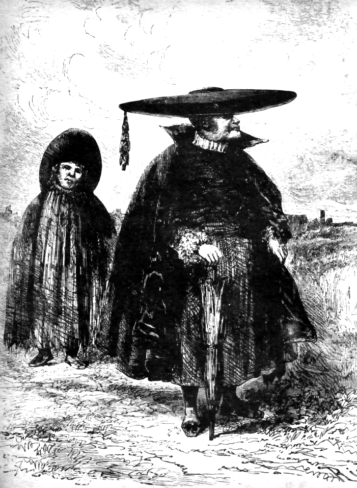 Sacerdote y sacristán peruanos. Cuzco, siglo XIX.